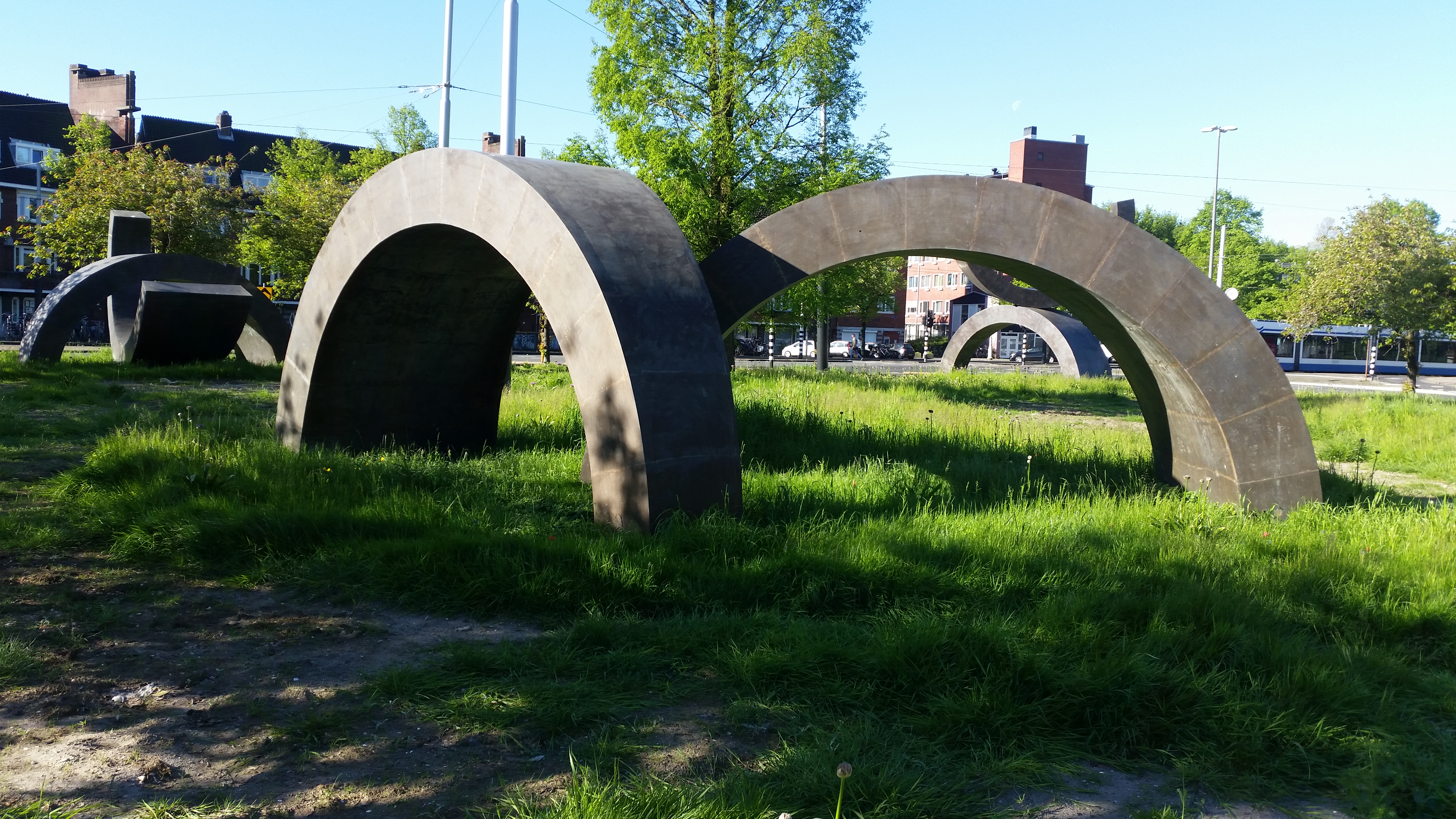 Cirkelelementen van André Volten, tijdelijk op het Surinameplein, Amsterdam